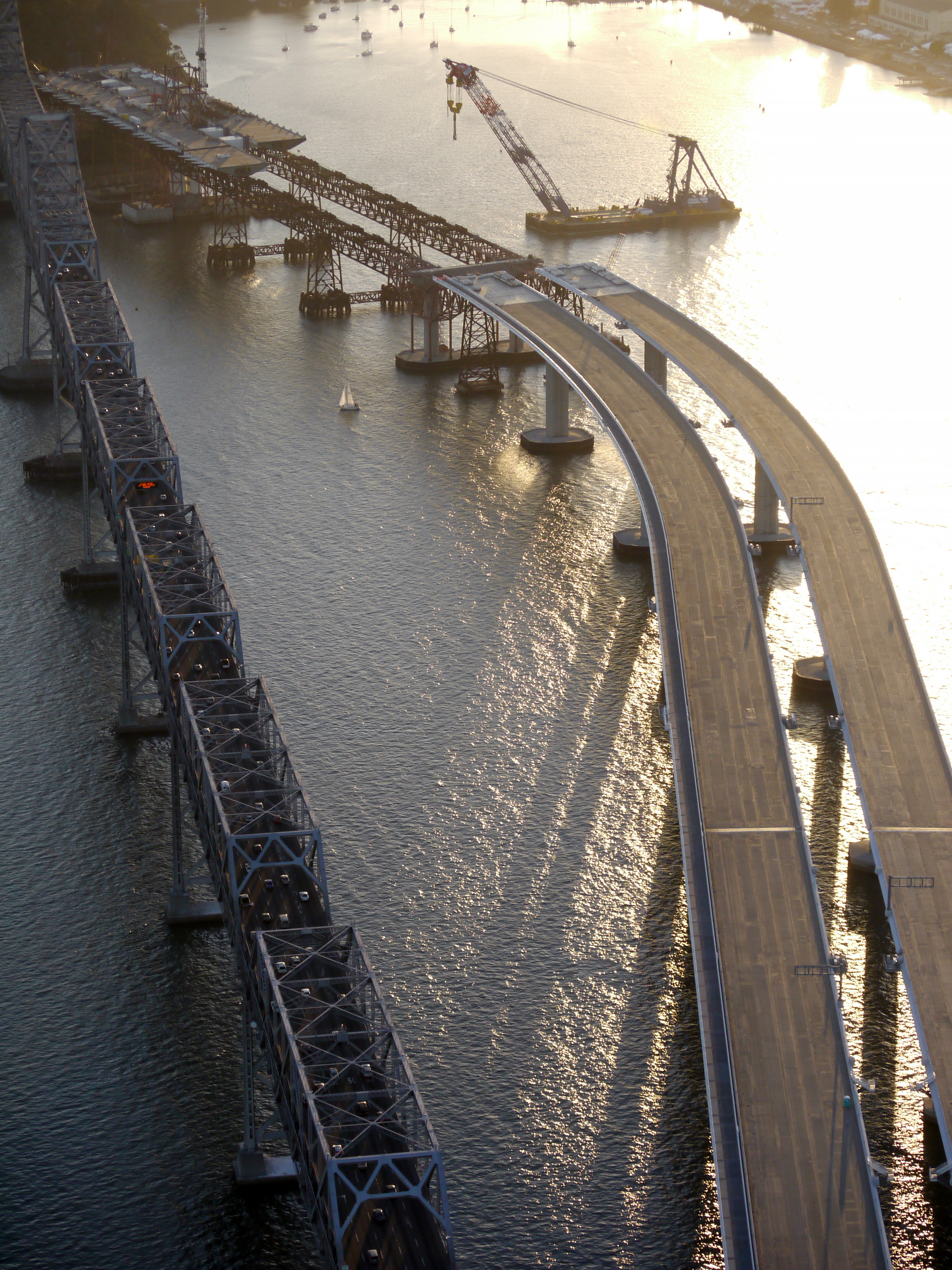 zeppelin-ride-020100925-211